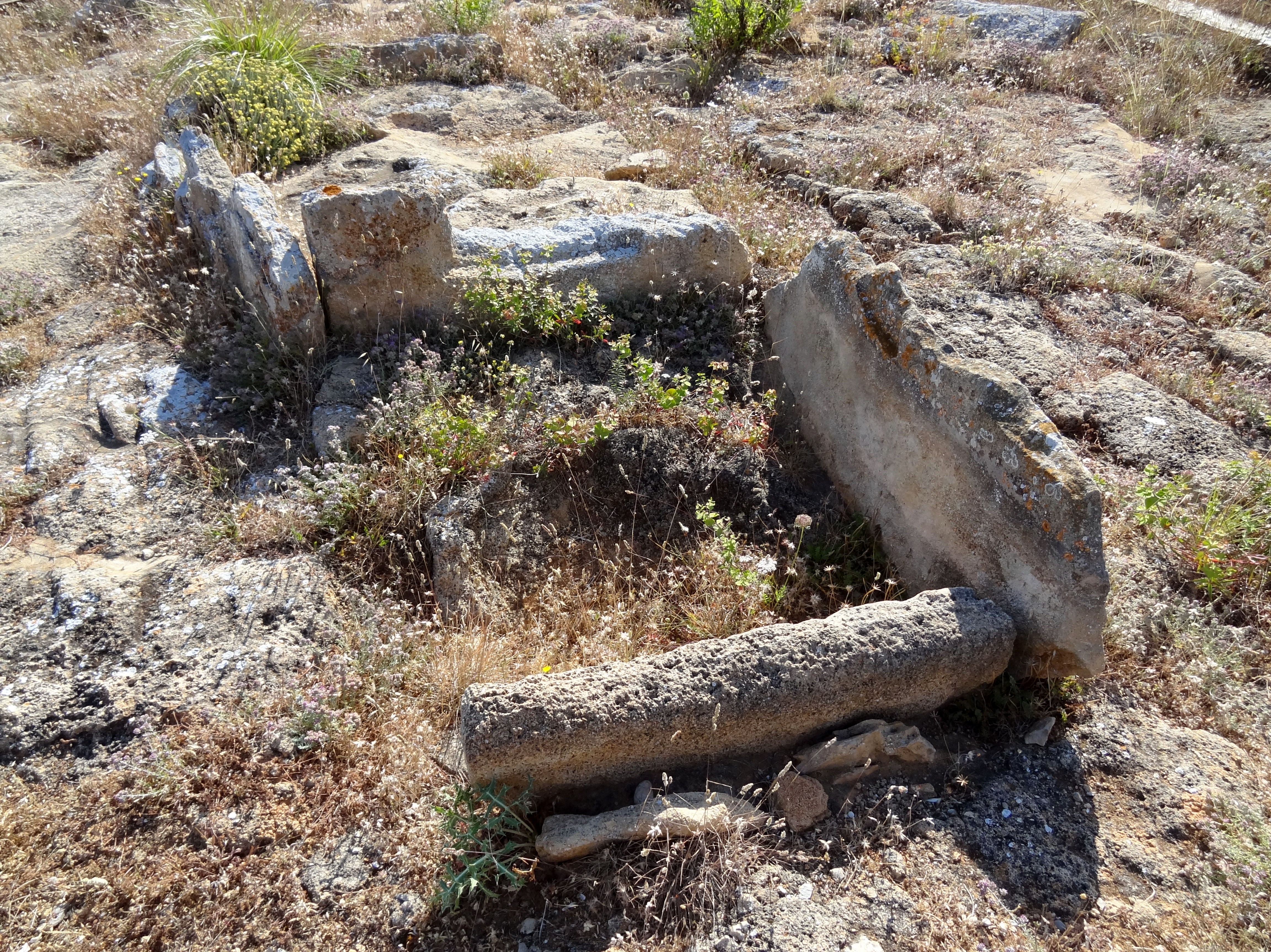 Der Dolmen de s’Aigua Dolça zwischen Colònia de Sant Pere und Betlem an der Nordküste von Mallorca, Spanien